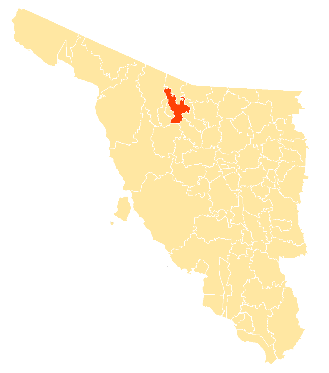 Municipio en Sonora, México.